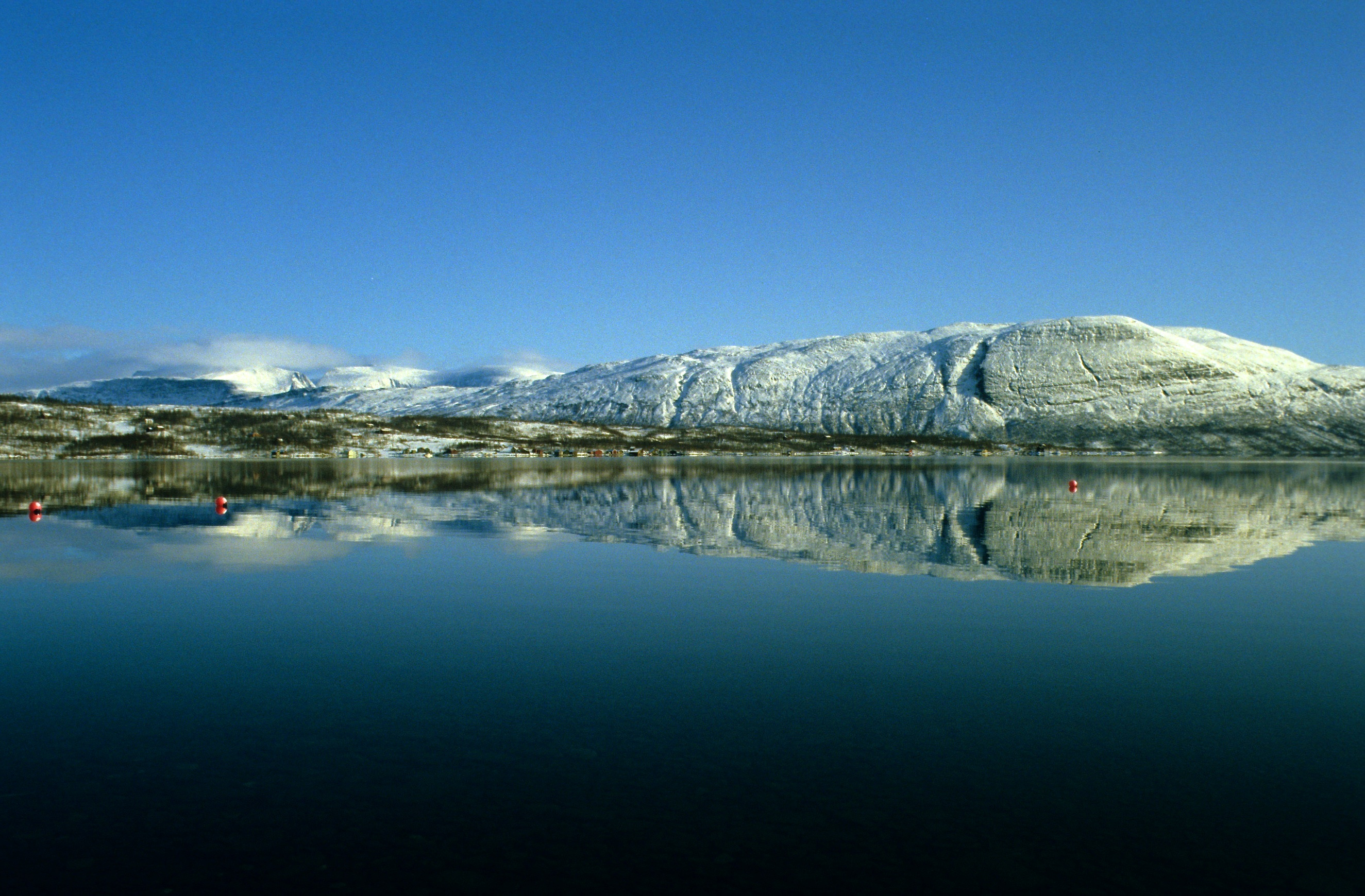 Der Altevatn bei einem frühen Wintereinbruch im September 1983